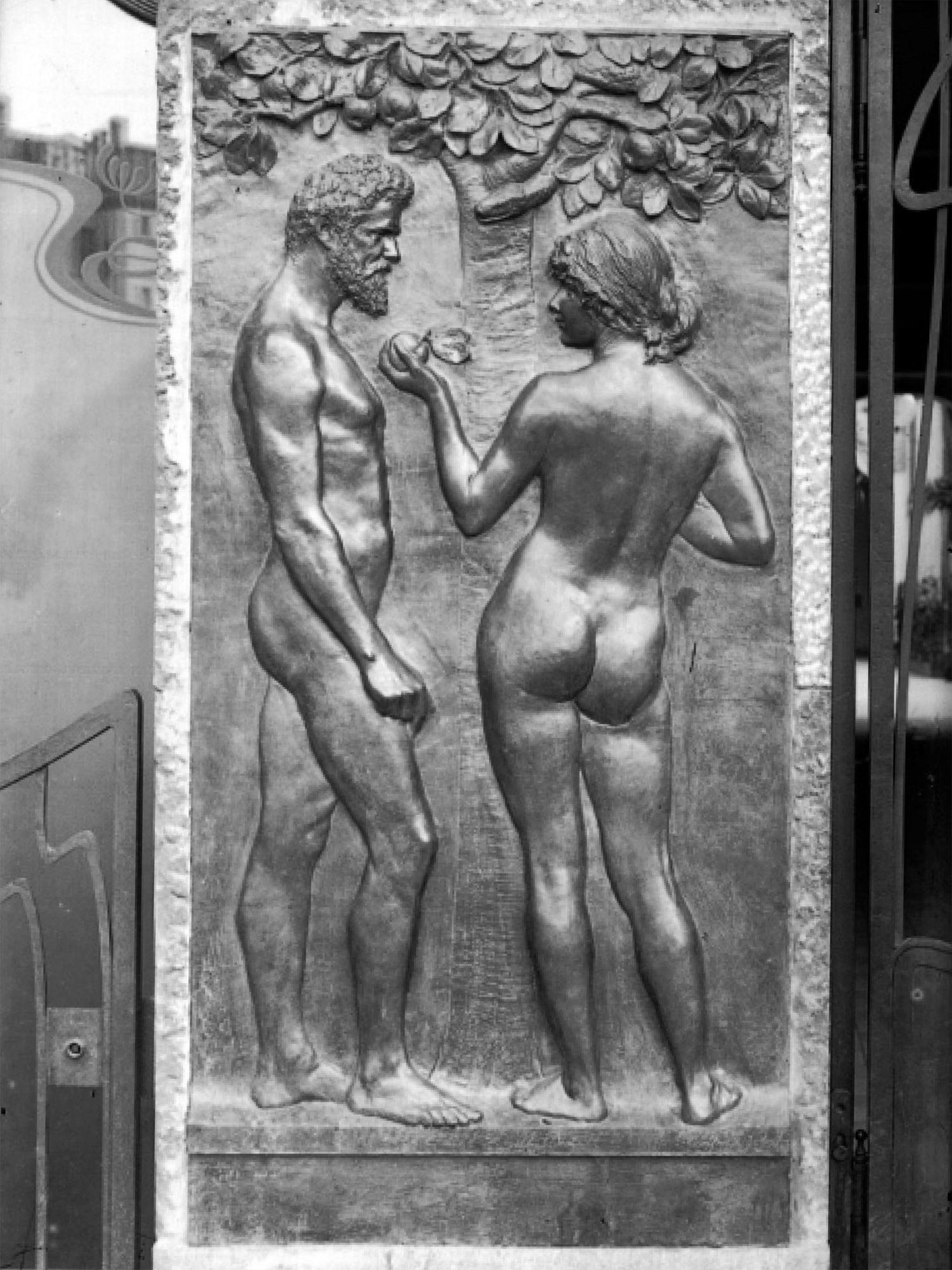 Künstlerhaus Leipzig: Bronzerelief „Adam und Eva“ von Carl Seffner am Hofeingang